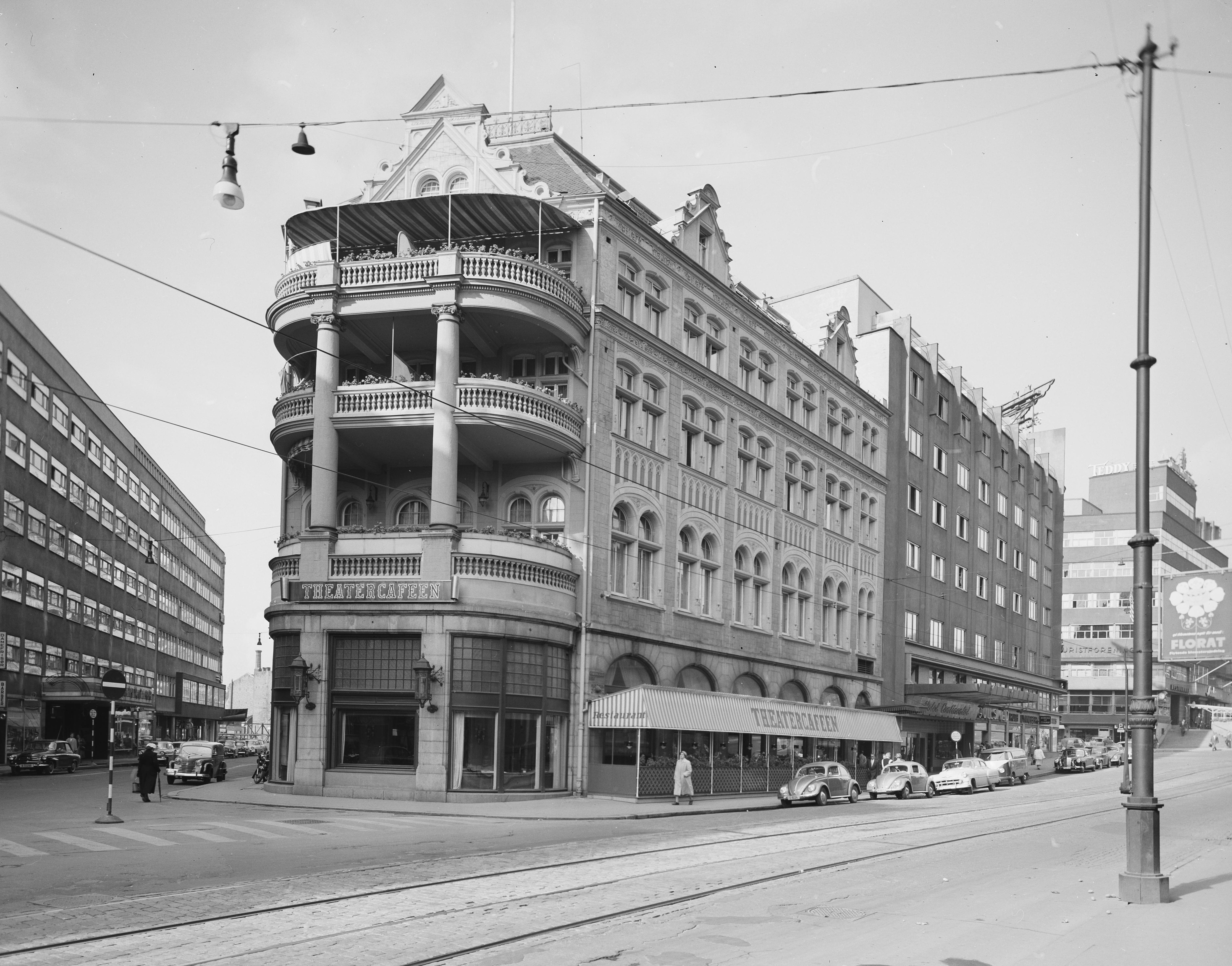 Bildet er hentet fra Nasjonalbibliotekets bildesamling Oslo, Oslo, Oslo